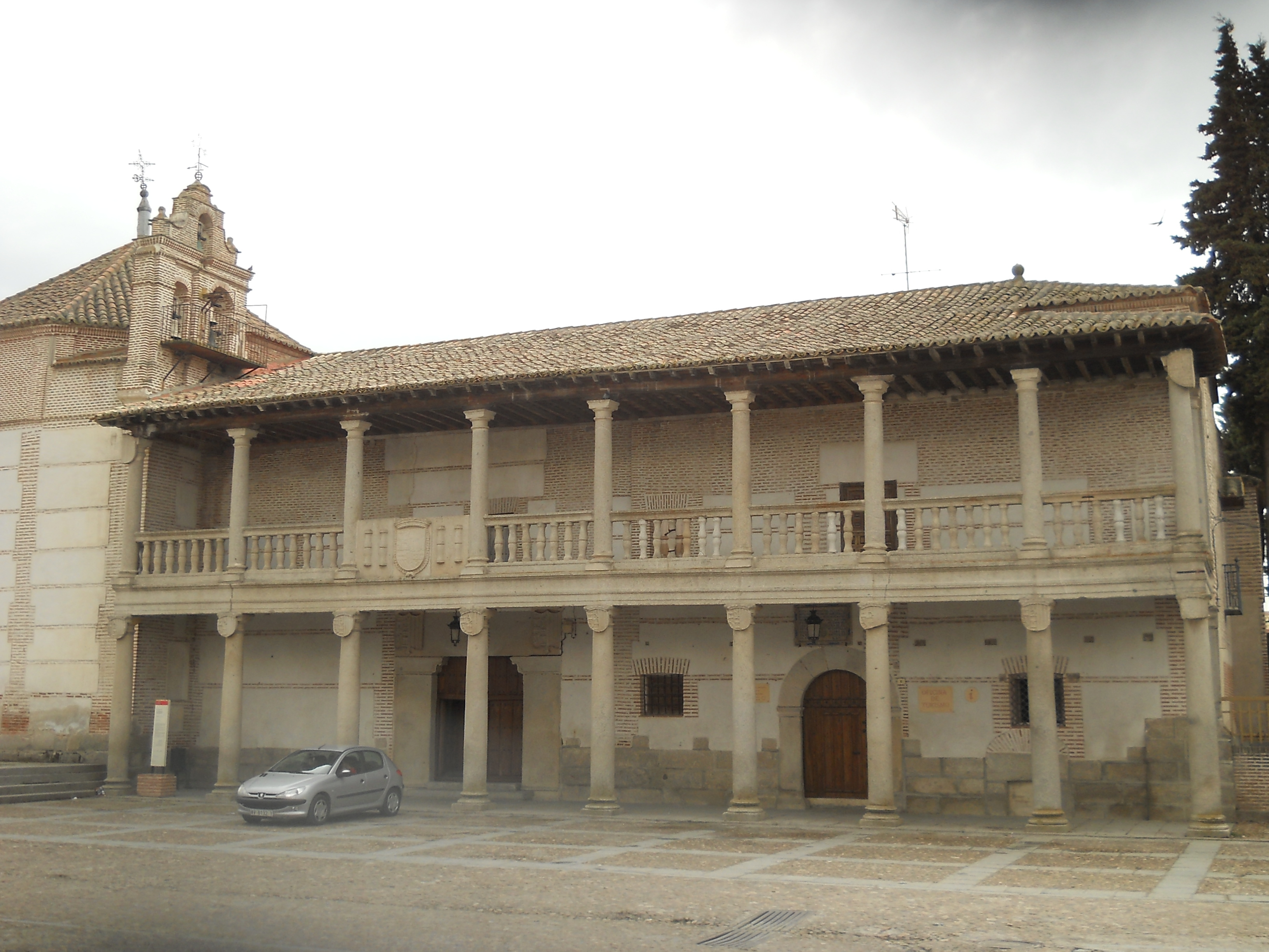 Hospital Real o de la Purísima Concepción, Madrigal de las Altas Torres, Ávila, España